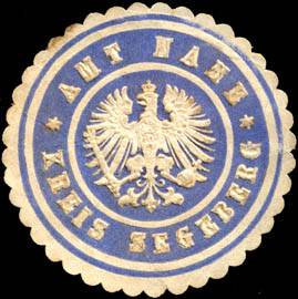 Sealing stamp Title: Amt Nahe - Kreis Segeberg Description: blau, weiß, geprägt Place: Nahe size: 4 cm